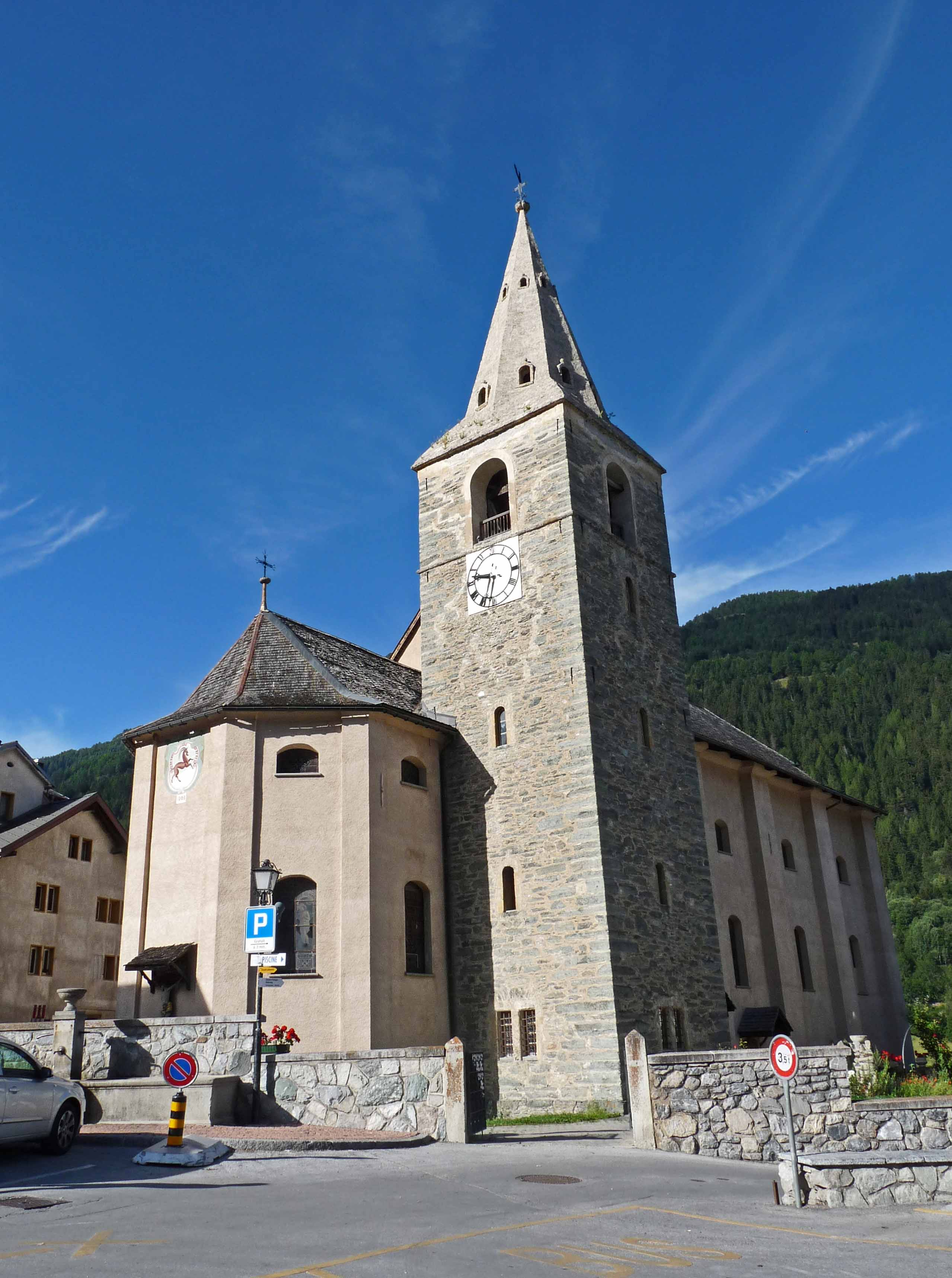 Eglise de Vissoie (Valais, Suisse)